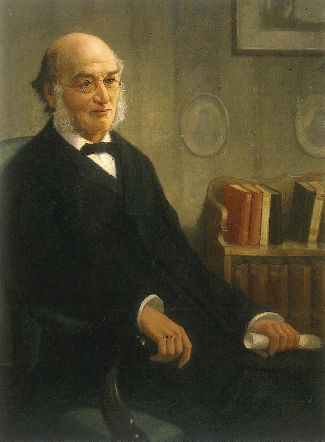 Peter Conradin von Planta, um 1900, Gemälde von Ernst Schweizer